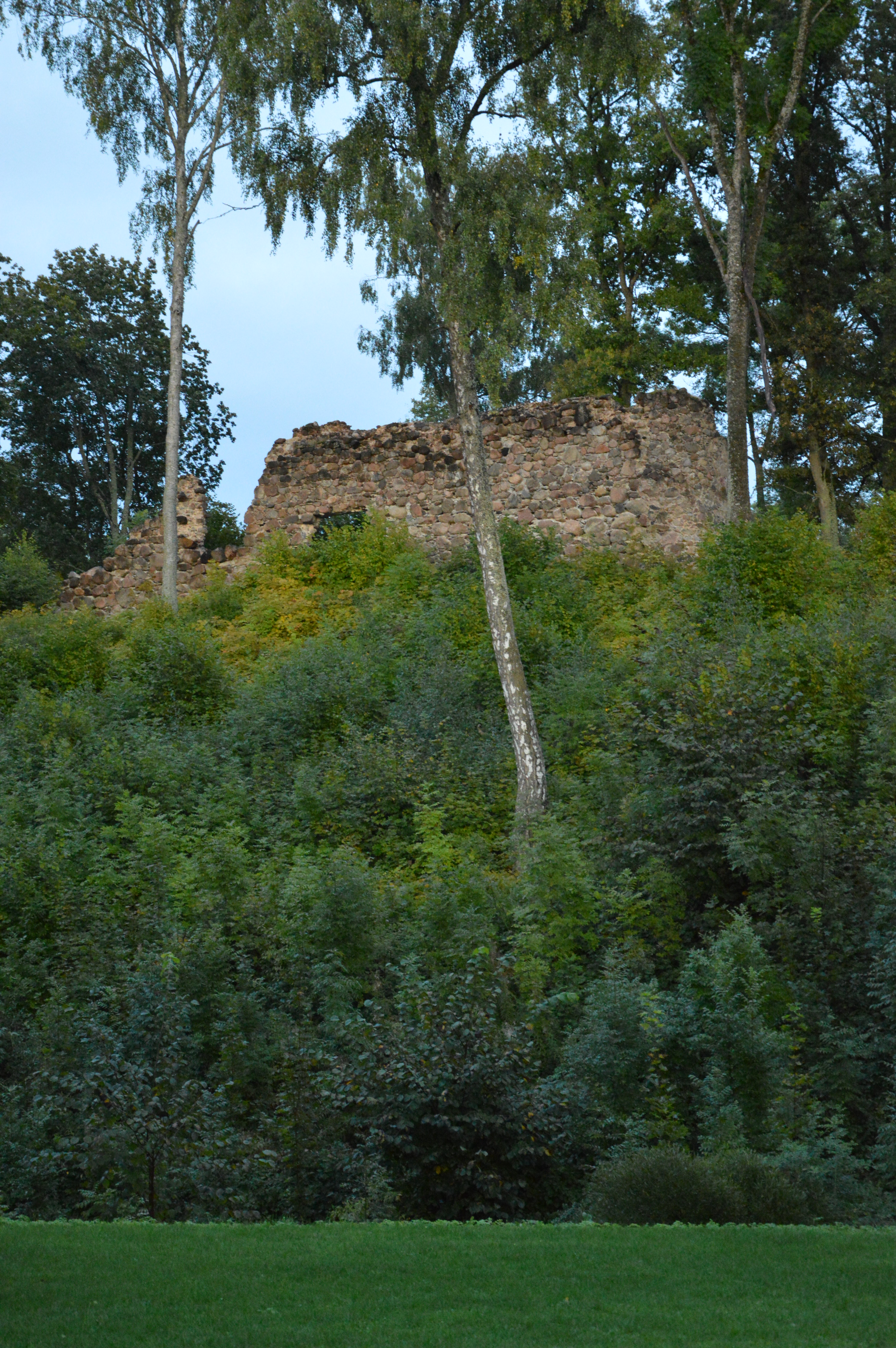 Rauna piiskopilinnus